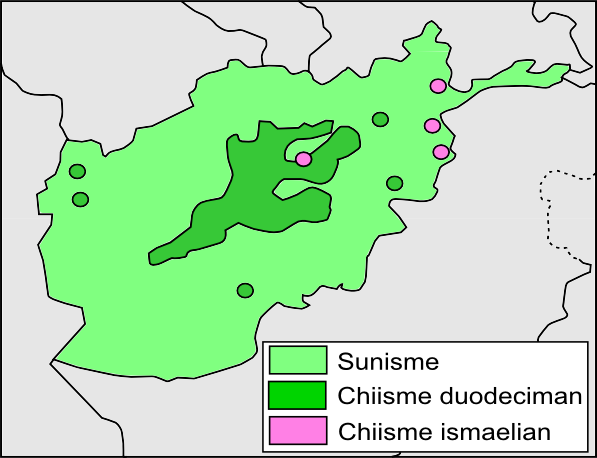 Carta religiosa d'Afganistan.